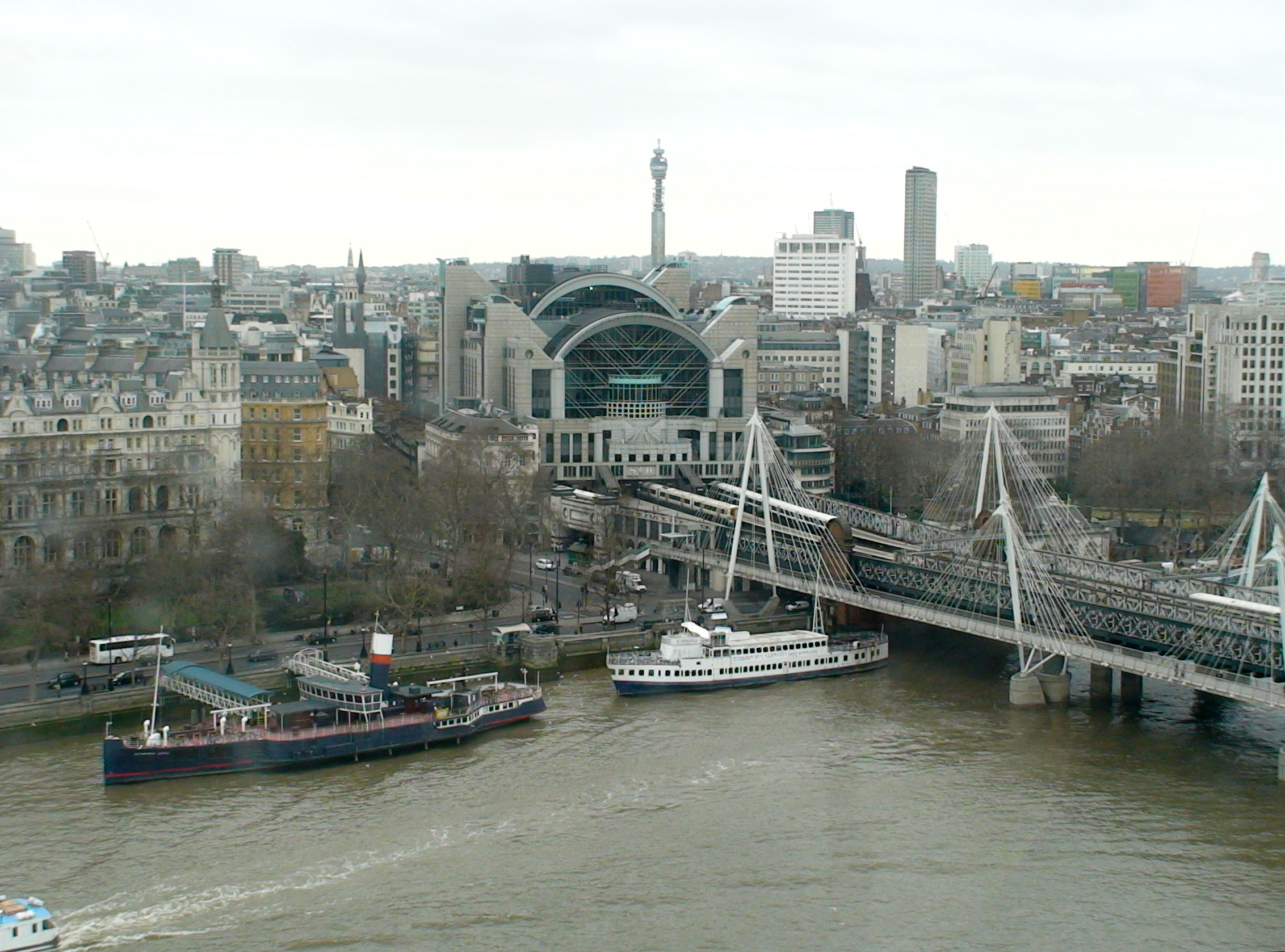 Станция Чаринг Кросс (Charing Cross Station) - одна из центральных железнодорожных станций Лондона